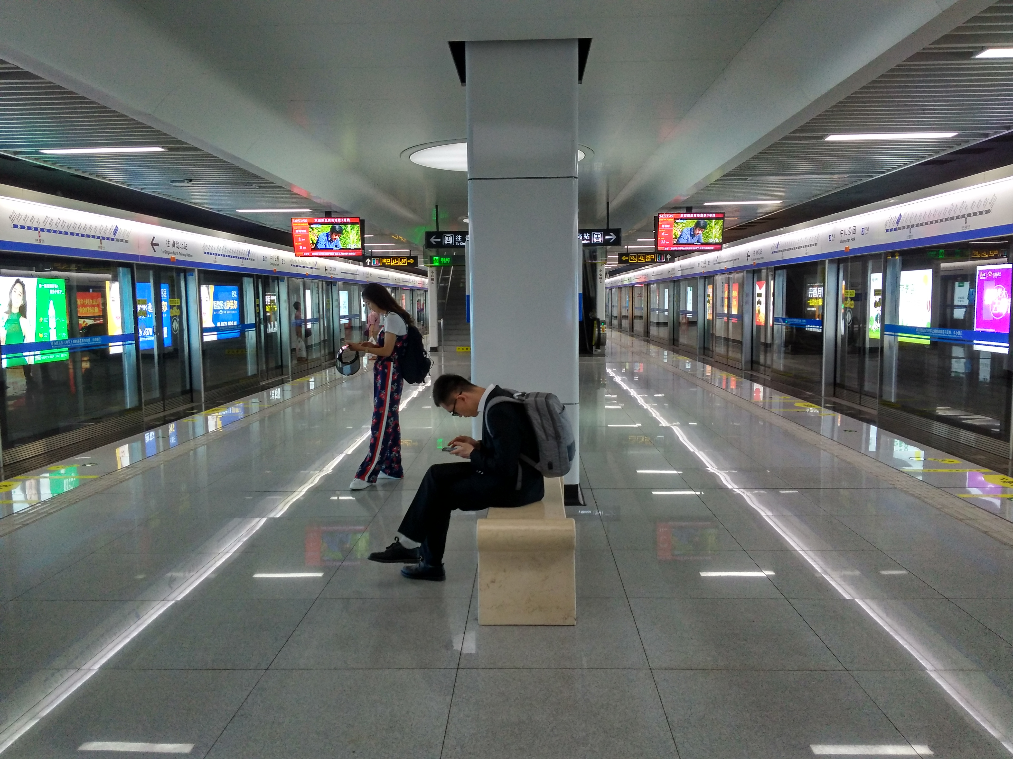 青岛地铁3号线中山公园站站台